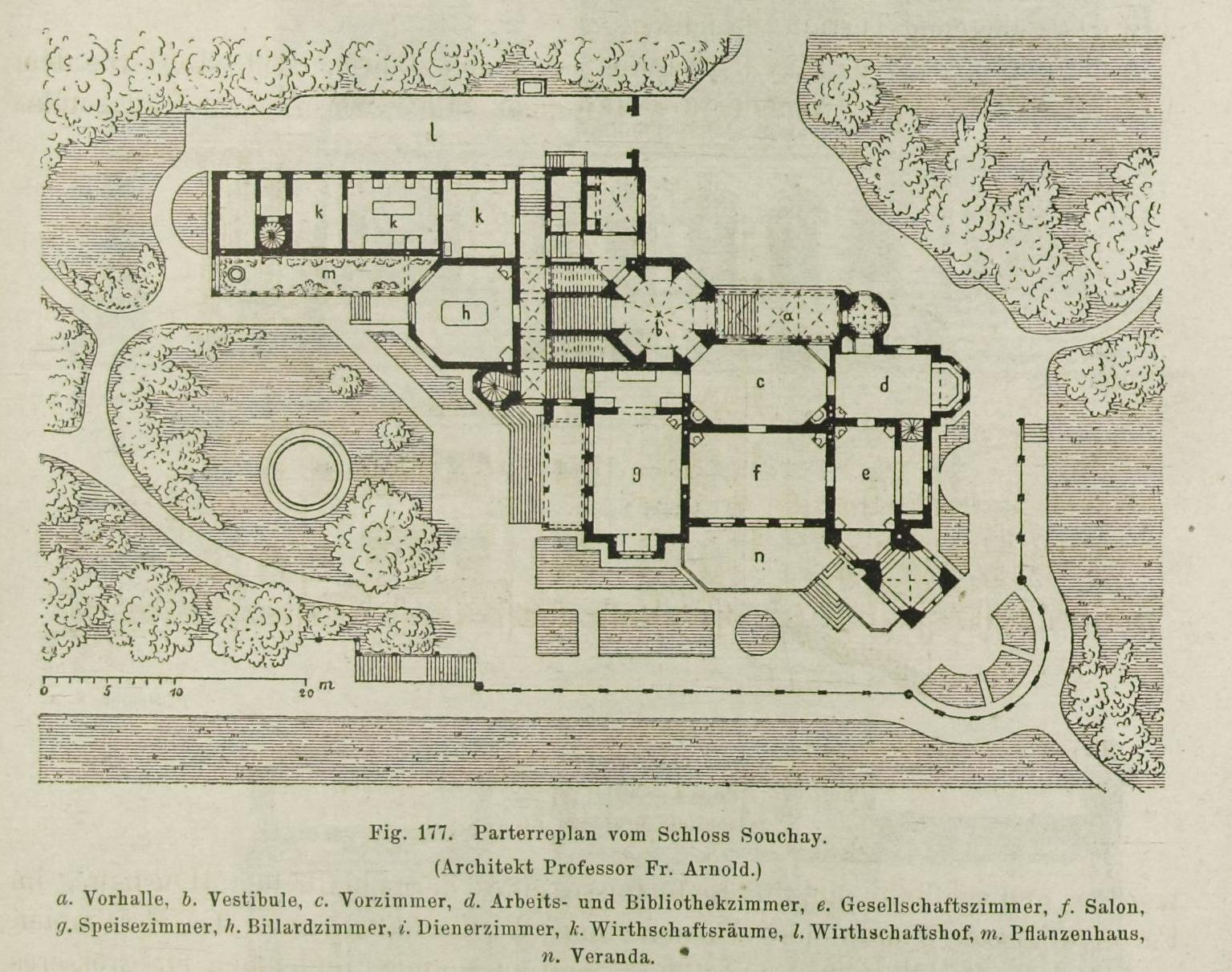 siehe Bildtext aus: Die Bauten, technischen und industriellen Anlagen von Dresden. Herausgegeben vom Sächs. Ingenieur- und Architekten-Verein und vom Dresdener Architekten-Verein. Meinhold, Dresden 1878